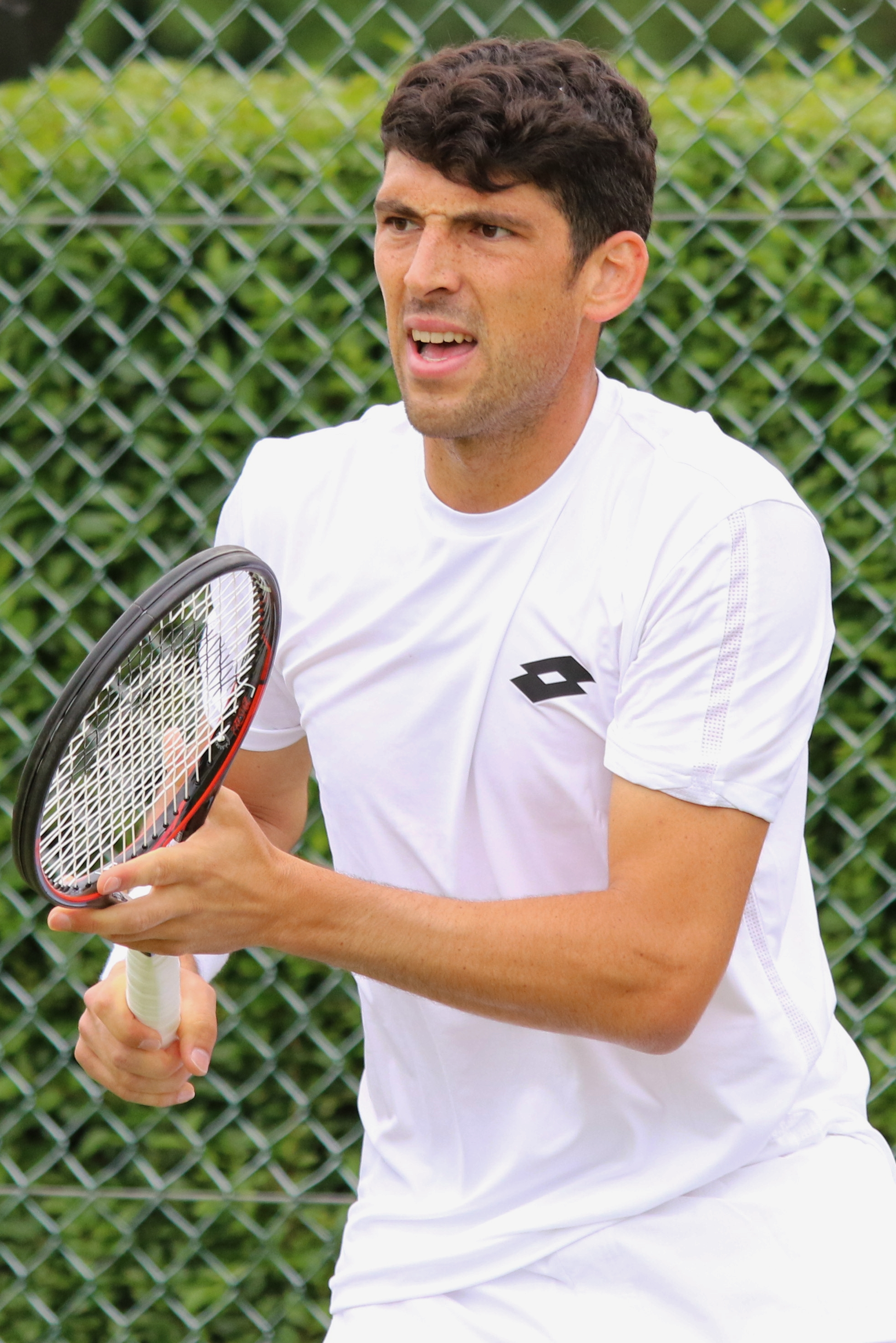 Skugor WMQ16 (13)